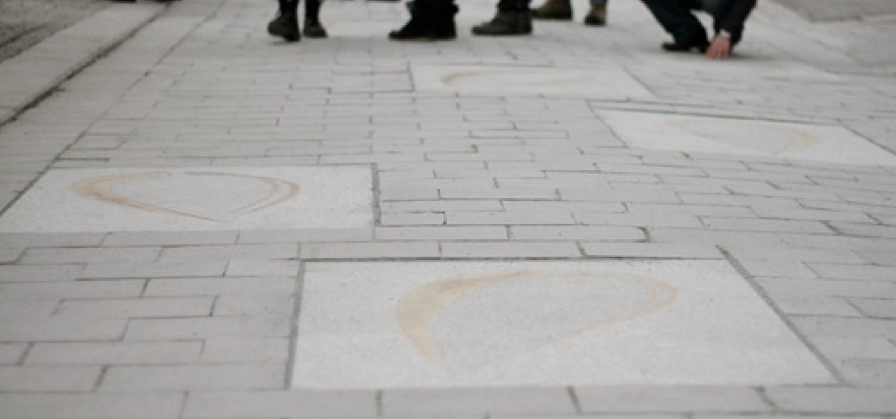 Walk of Peace